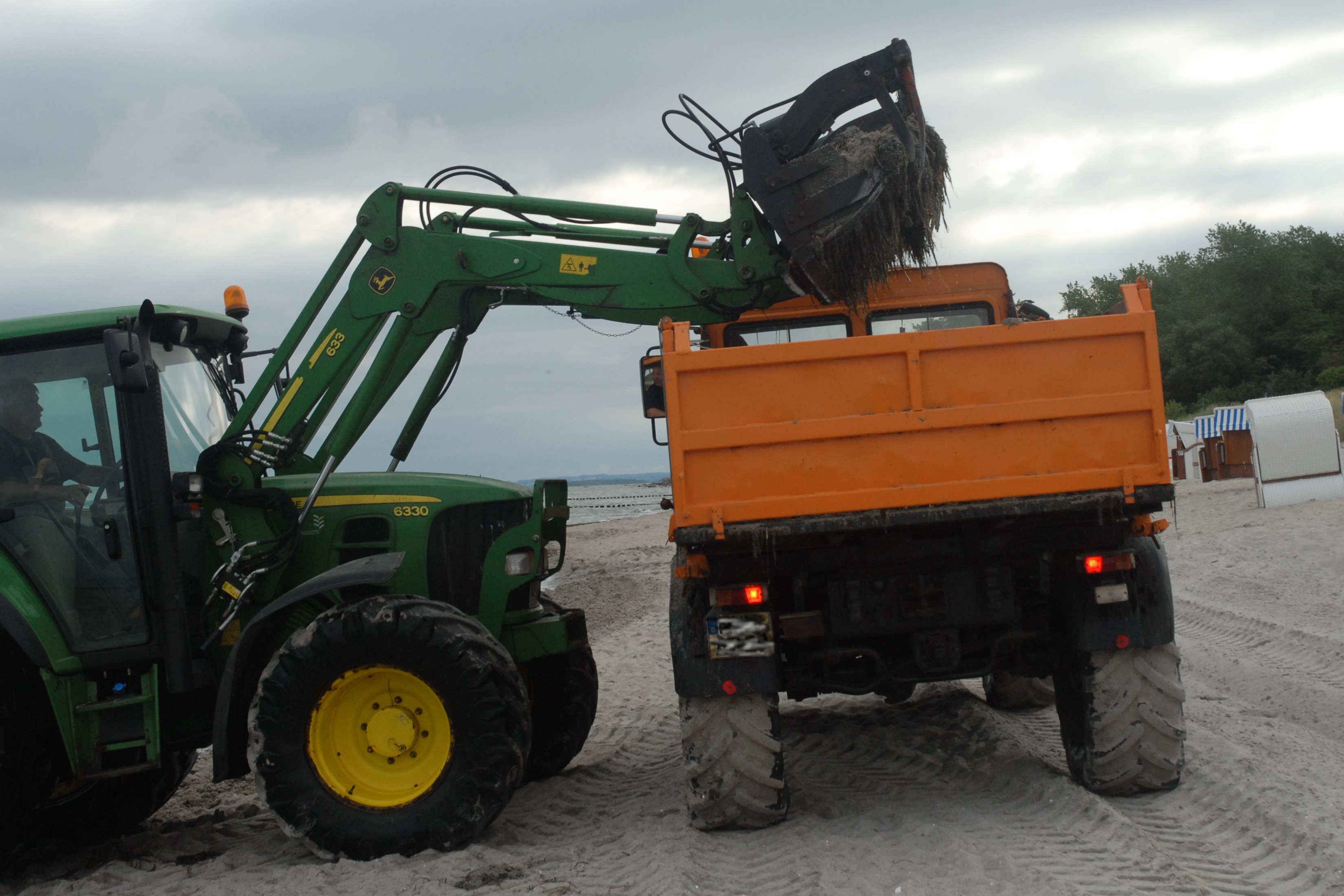 Auf der Insel Poel wird frisch aufgenommenes Strandräumgut zum Abtransport auf einen Kipplaster geladen.